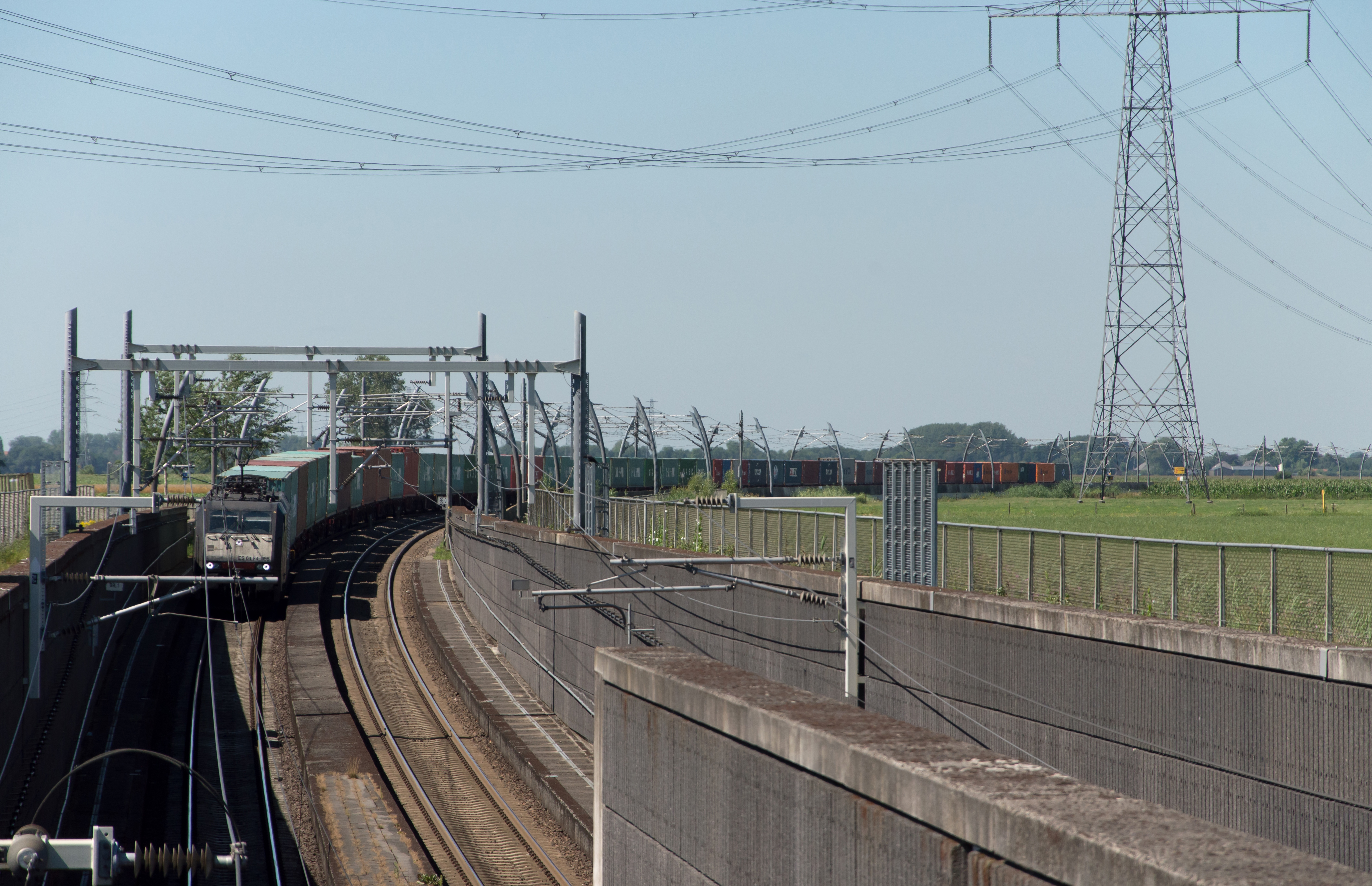 Een containertrein onderweg van de Rotterdamse havens verder Europa in via de Betuweroute. Hier vlakbij Bemmel/Angeren. A containertrain en route from the Rotterdam container ports in Europe through the Betuwe route. Here near Bemmel/Angeren.